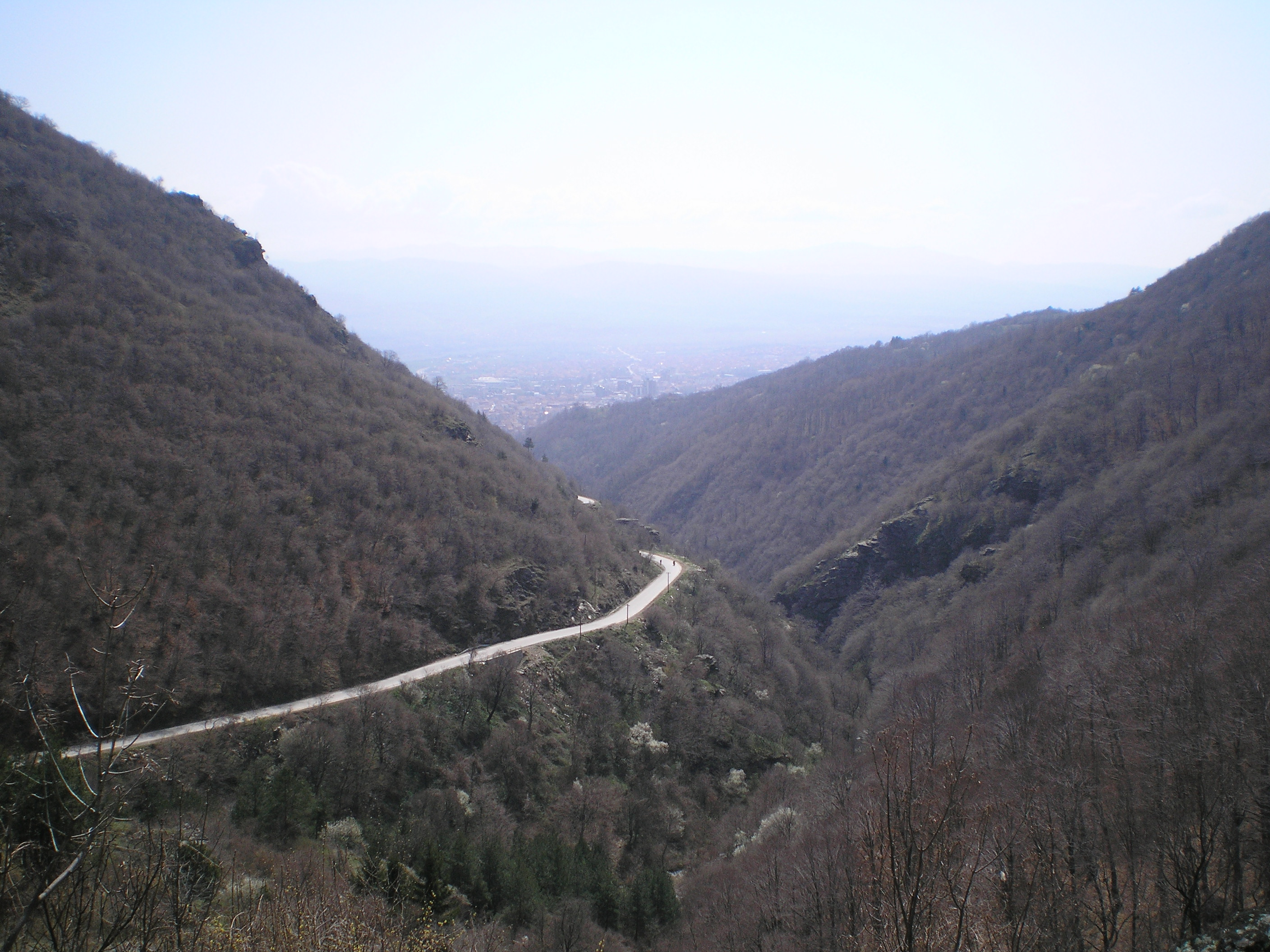 george of Gradska reka, near Vranje